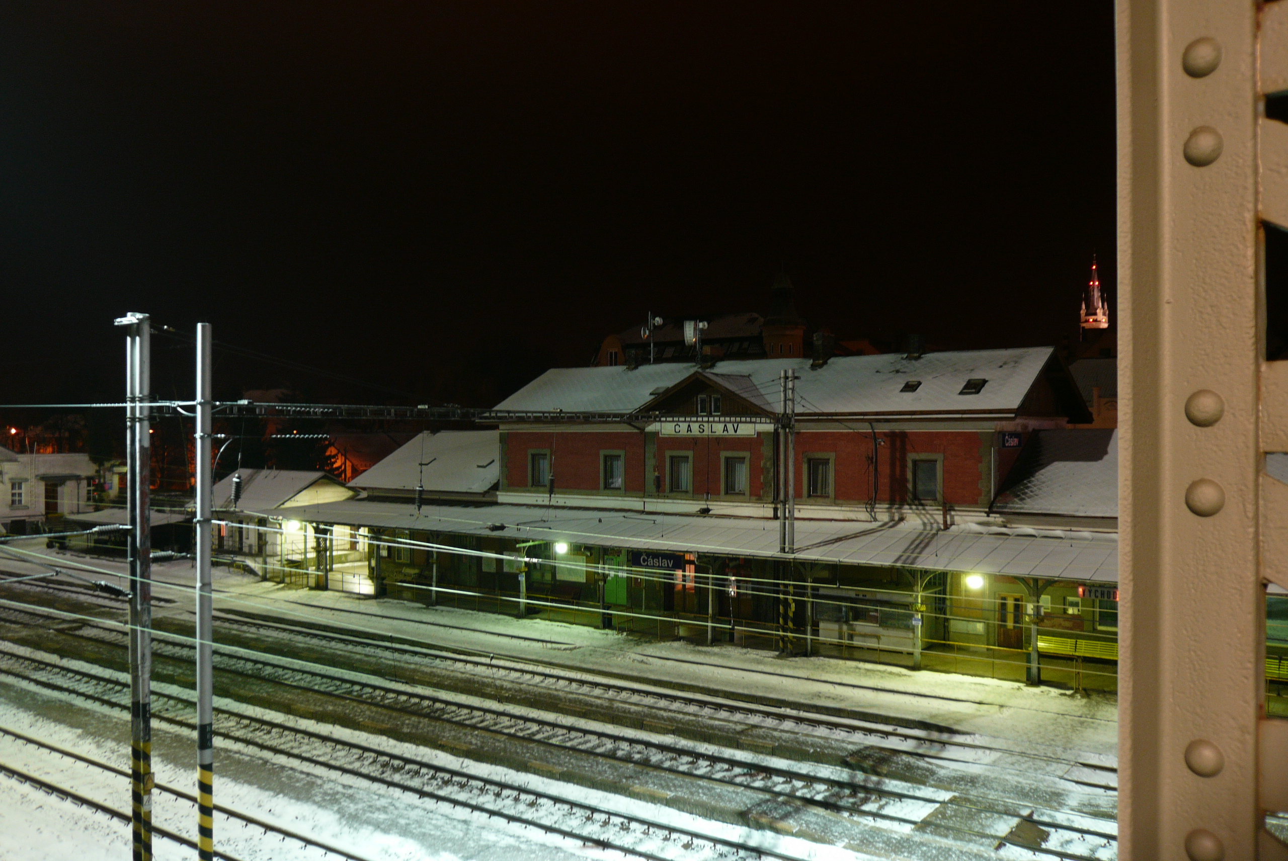 Čáslav, vlakové nádraží